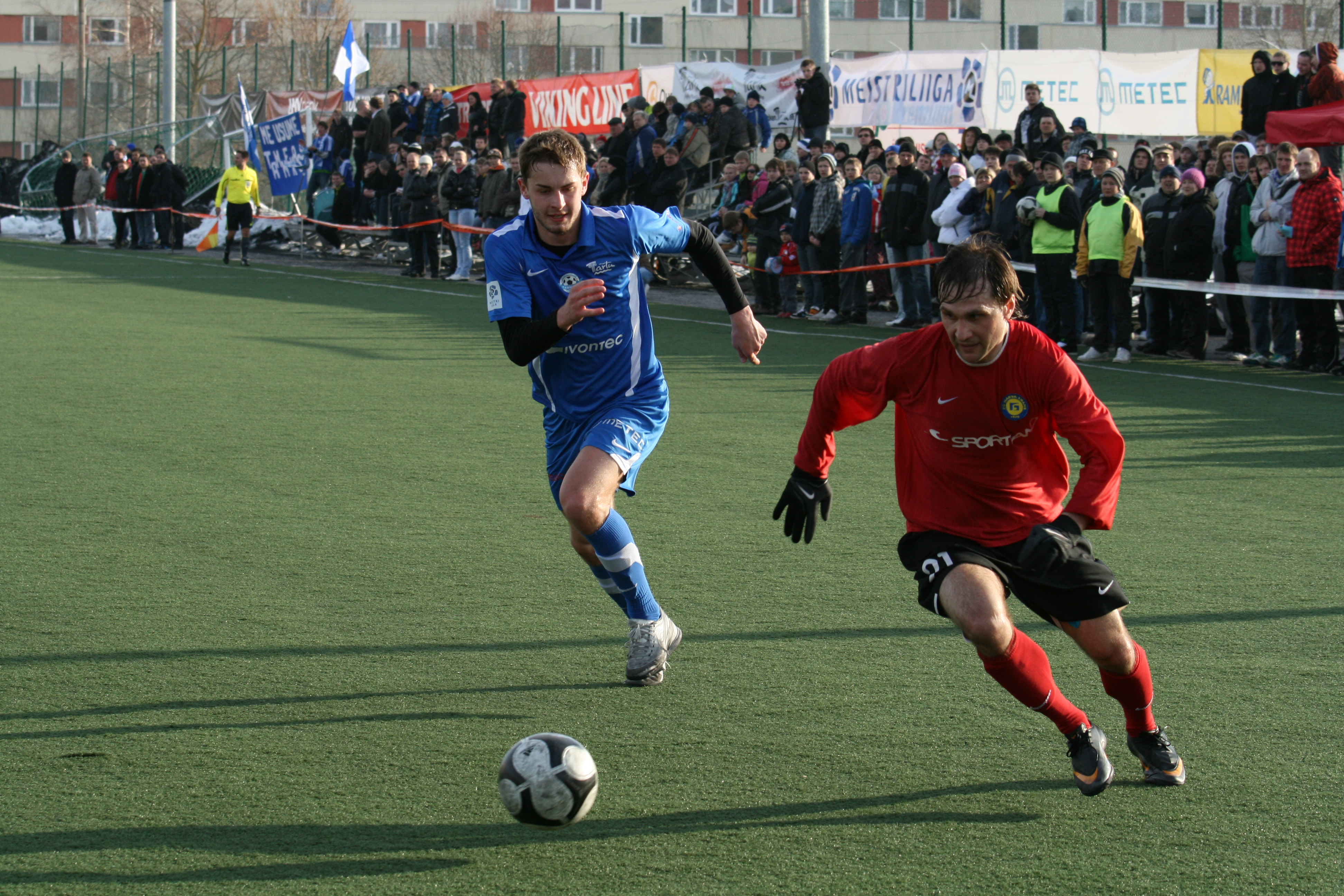 Narva Trans (punases)